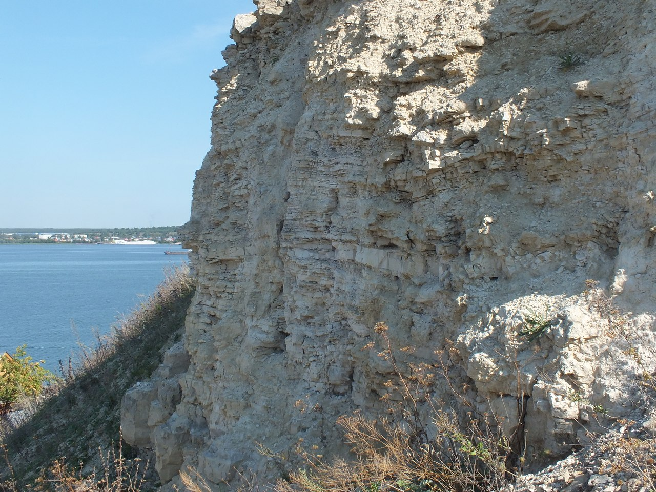 Печищинский геологический разрез, Верхнеуслонский район This image is related to the protected area of Russia number 1610061